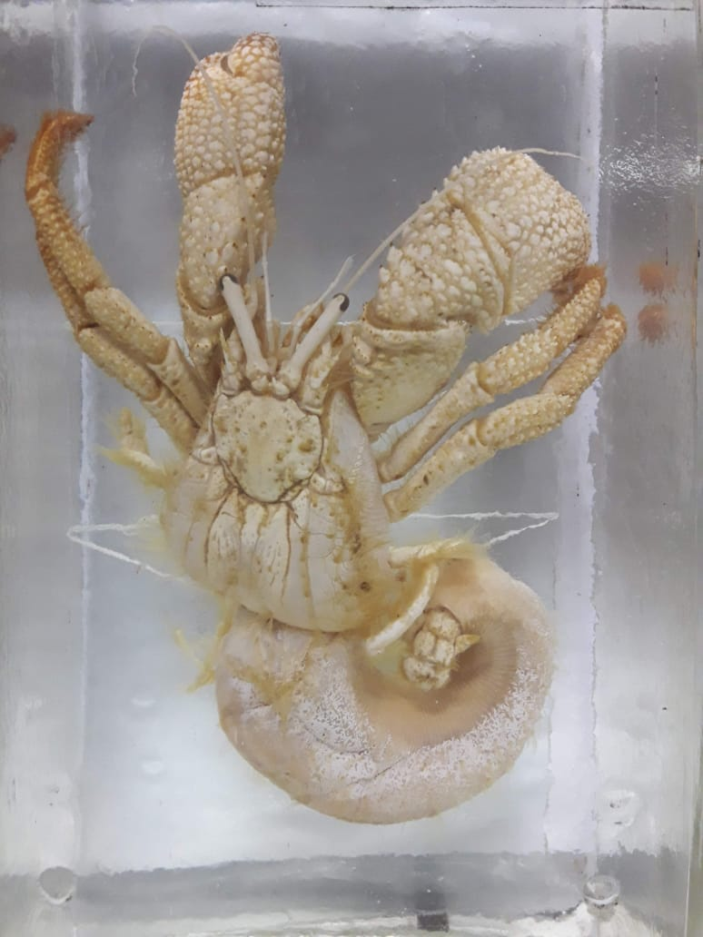 Espécie de crustáceo da ordem decapoda.